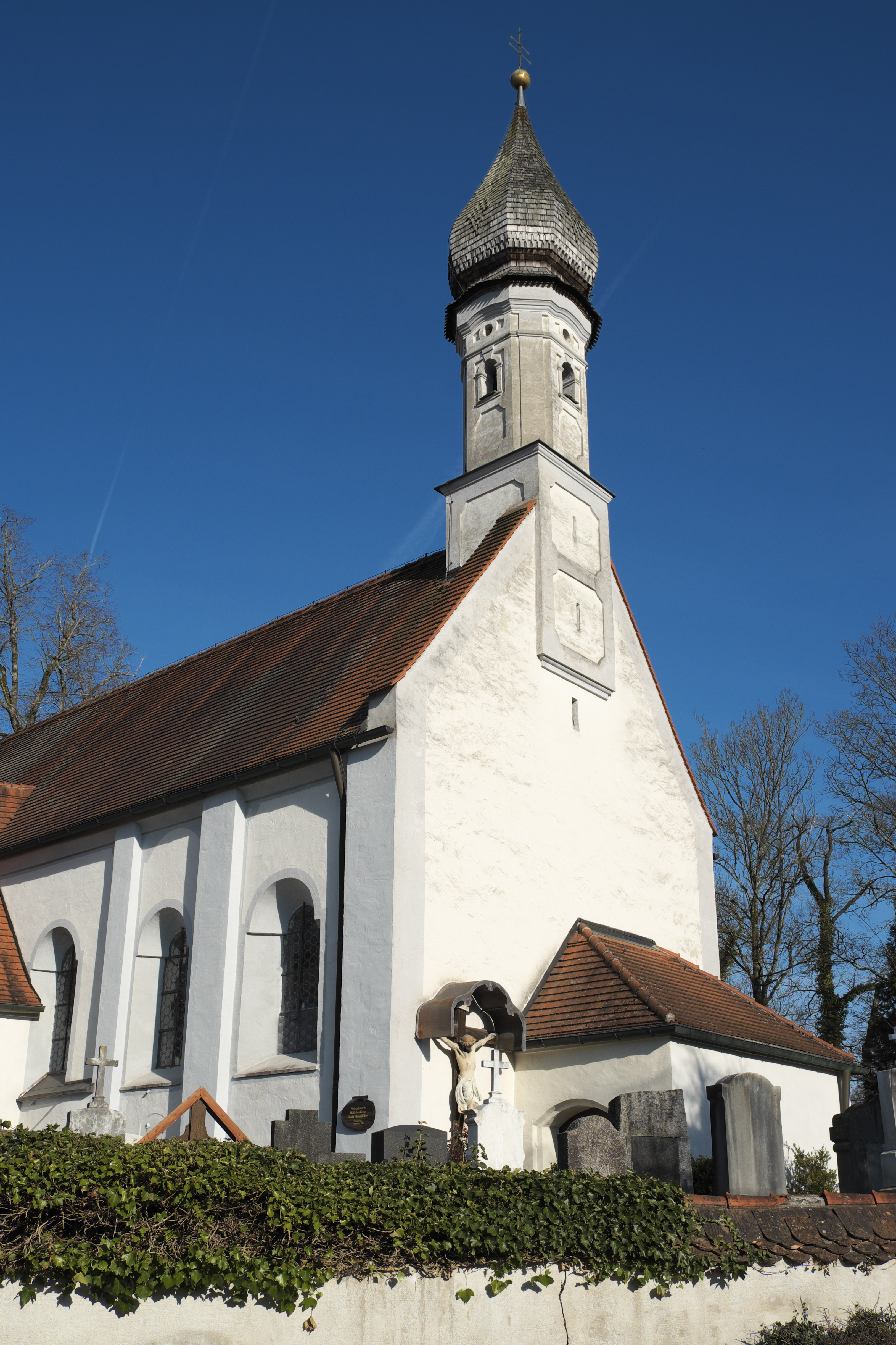 Ehemalige katholische Hofmarkskirche in Bernried im Landkreis Weilheim-Schongau (Bayern/Deutschland)